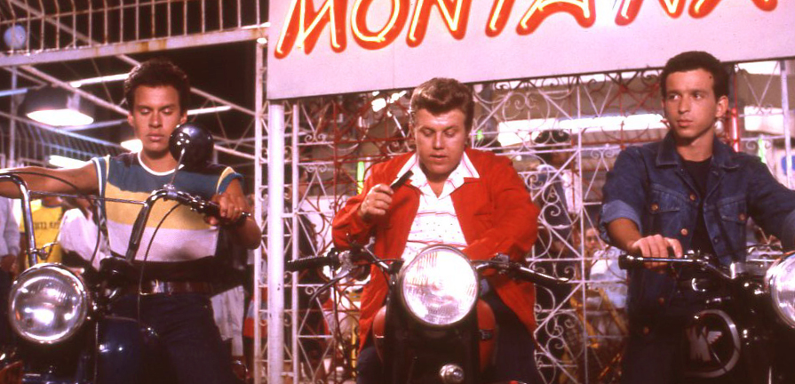 מומו, בנצי ויודלה על אופנועים